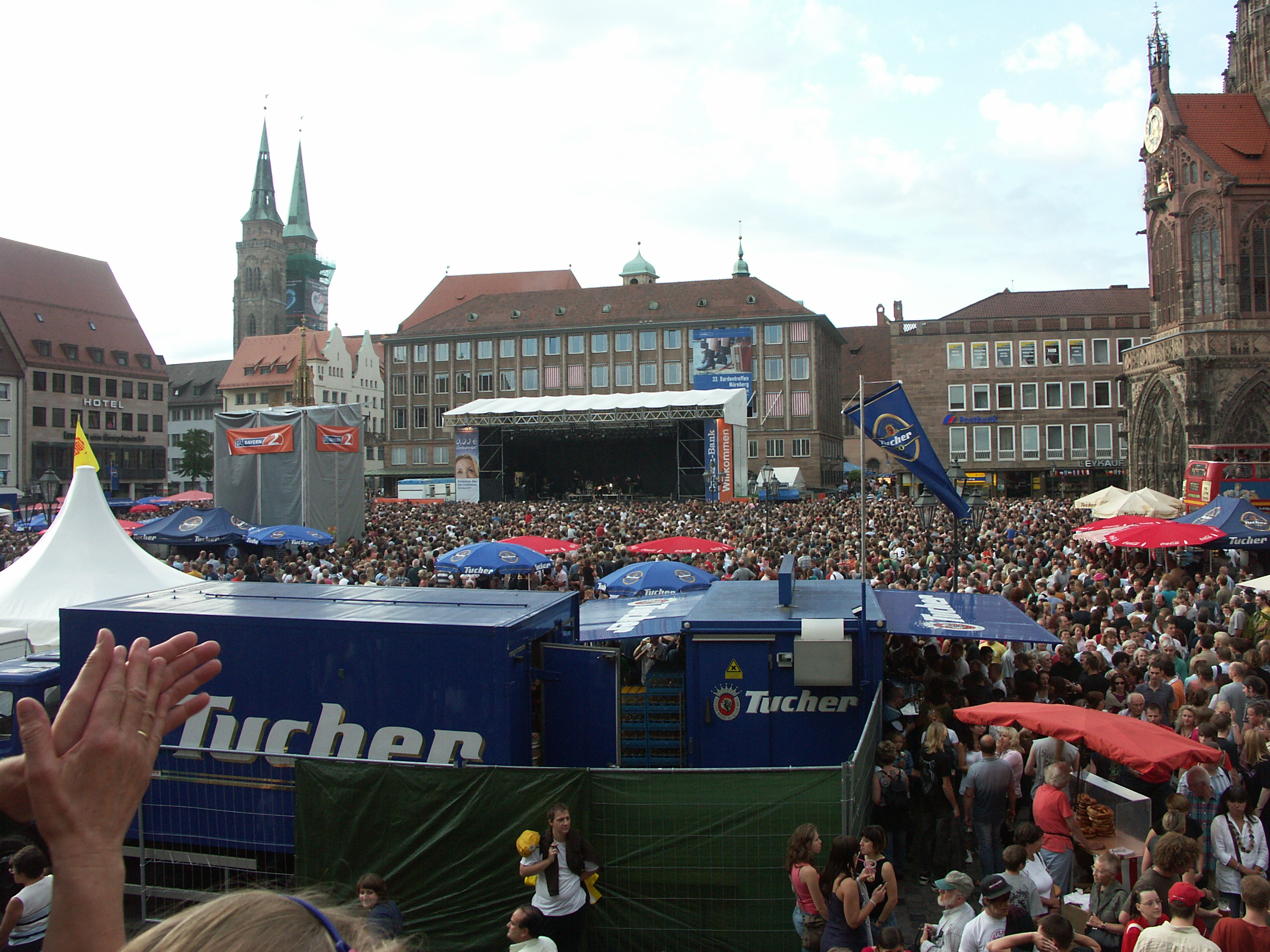 Joan Armatrading auf dem Hauptmarkt - 33. "Bardentreffen" in Nürnberg 01.-03. August 2008 - 33rd world musik festival "Bardentreffen" at Nuremberg / Germany